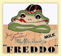 Freddo Frog wrapper, 1930